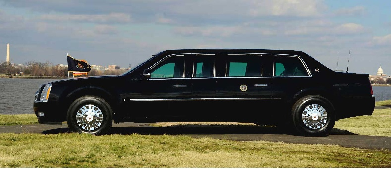 2009 Cadillac Presidential Limousine.